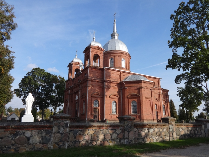 Utena 3